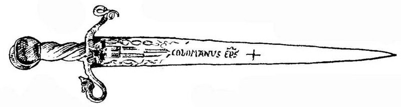 Венецианский гражданский меч, клинок длиной 78 см с именем Кальмана Книжника, короля Венгрии в 1095—1114, работы XIV в.; рукоять из слоновой кости, вырезанная в форме бивня нарвала, и металлическое позолоченное навершие в восточном стиле — кон. XV в.